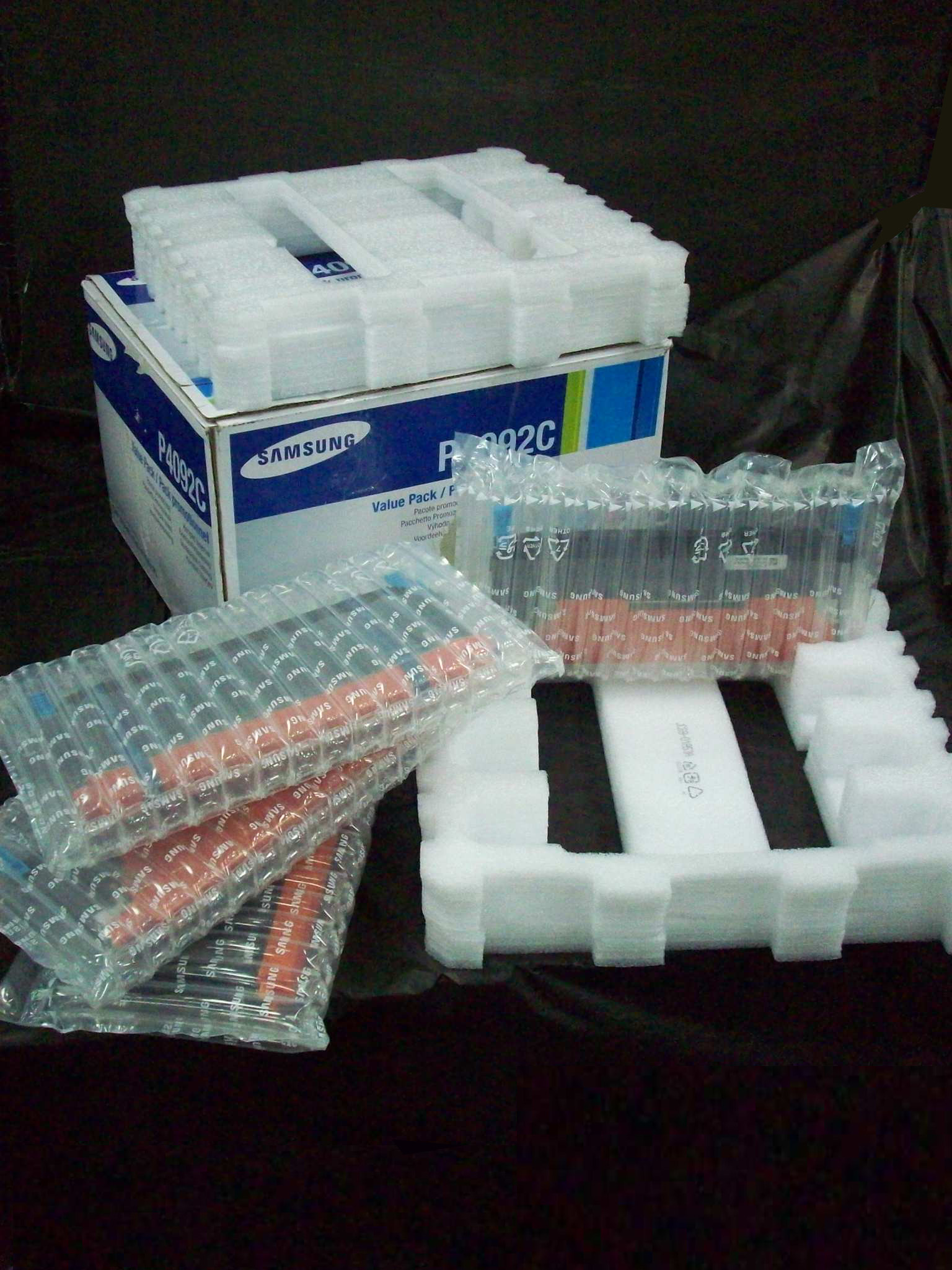 三星電子印表機碳粉匣使用空氣包裝作為緩衝包裝。